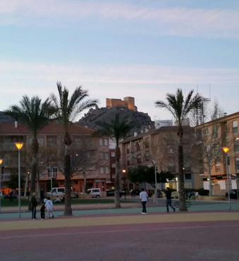 Mula, Murcia